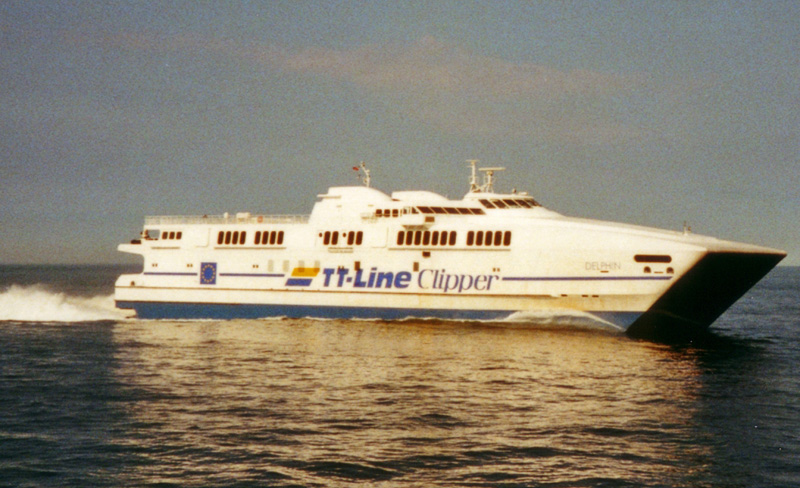 HSC Delphin der TT-Line / Hansesail 2000